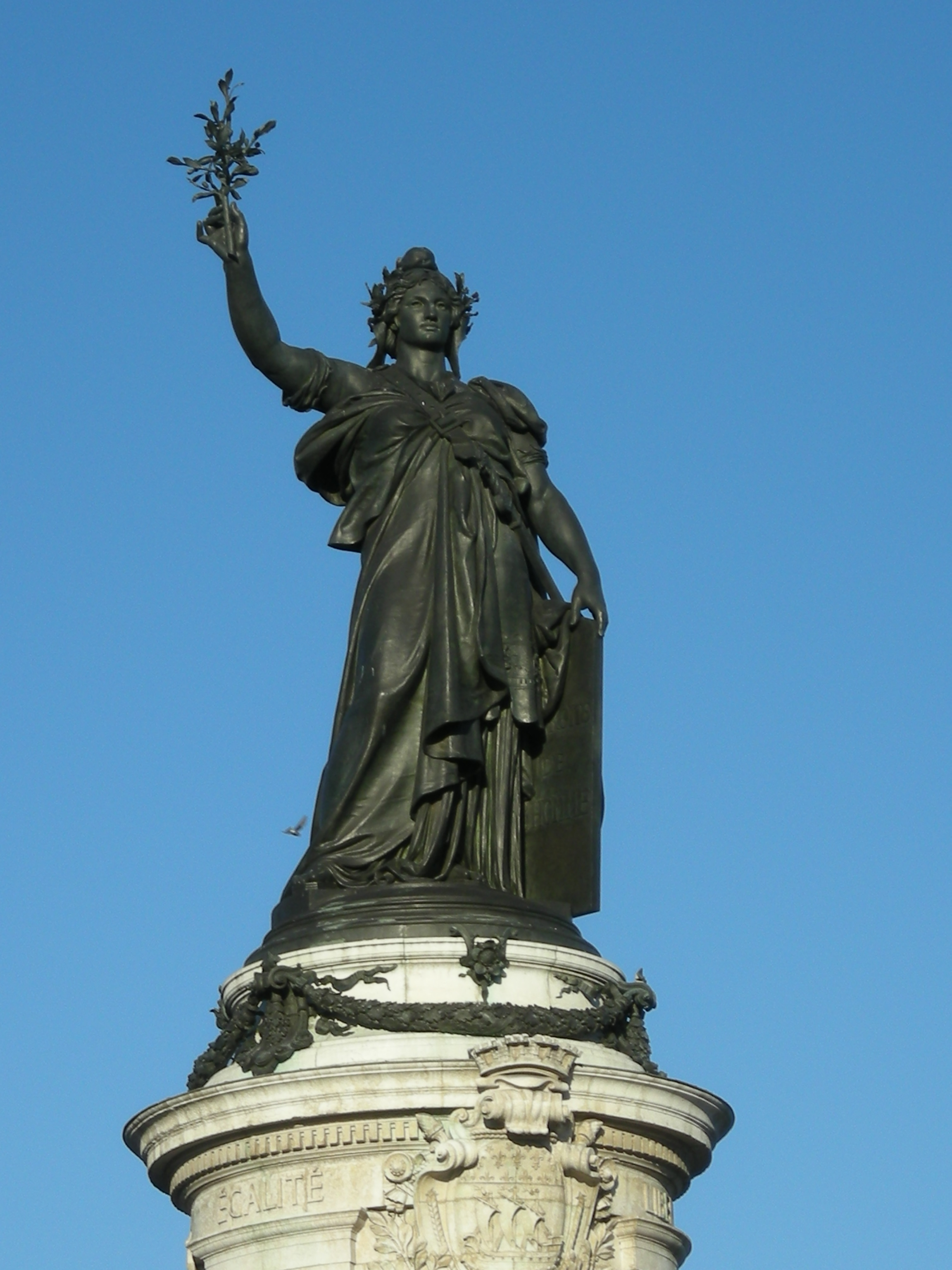 Statue place de la République à Paris